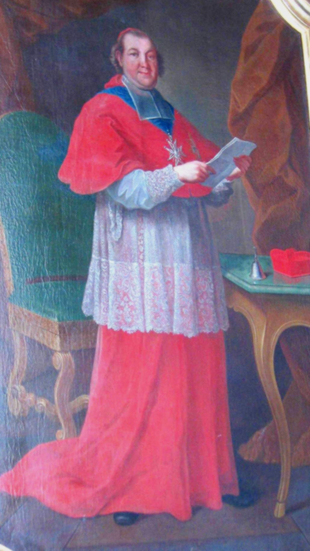 Jan Aleksander Lipski Bishop of Kraków author-Maciej Szczepańczyk user:Mathiasrex